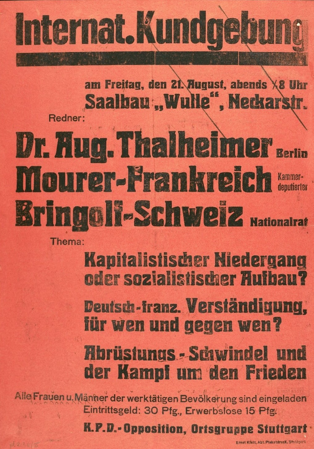 August Thalheimer, Jean-Pierre Mourer und Walther Bringolf in Stuttgart, Saalbau Wulle. Plakat, 60 x 42 cm